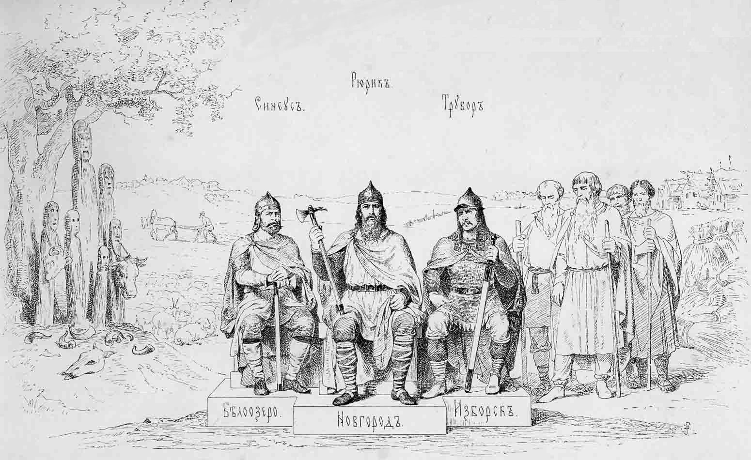 Призвание князей варяжских. Князь Рюрик. 862-879 г. Славяне Новгородские, Кривичи, Весь и Чудь отправили посольство к Варягам-Руси сказать им: "идите княжить и владеть нами". Пришли три брата: Рюрик, Синеус и Трувор, с дружиною. От них прозвалась Русская земля. По смерти братьев Рюрик княжил единовластно.